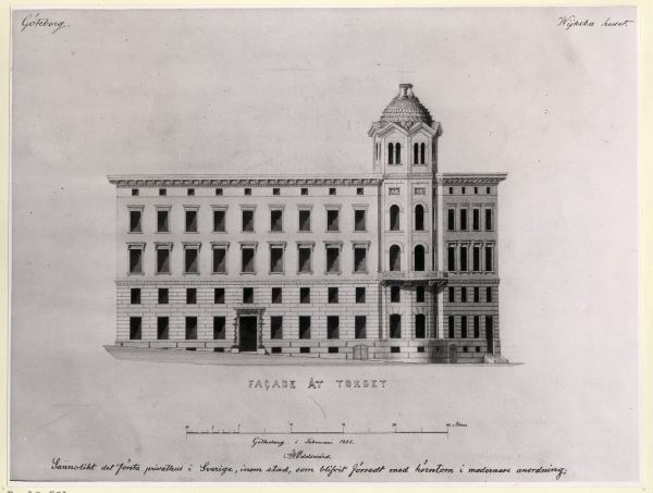 Wijkska huset, Lilla Torget 1, ritning 1851 av Adolf W. Edelsvärd. Göteborgs Stadsmuseums bildsamling. Text: Götheborg i Februari 1851, A.W Edelswärd "Facade åt torget".